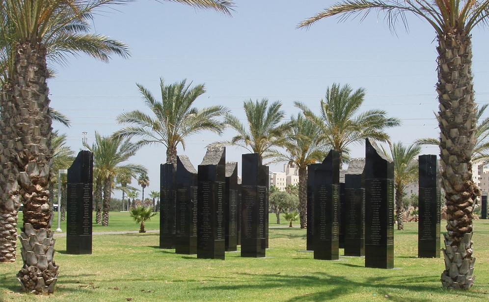 תל אביב, גן הבנים, אנדרטה לחללי תל אביב במלחמת העצמאות. צילם דוד שי